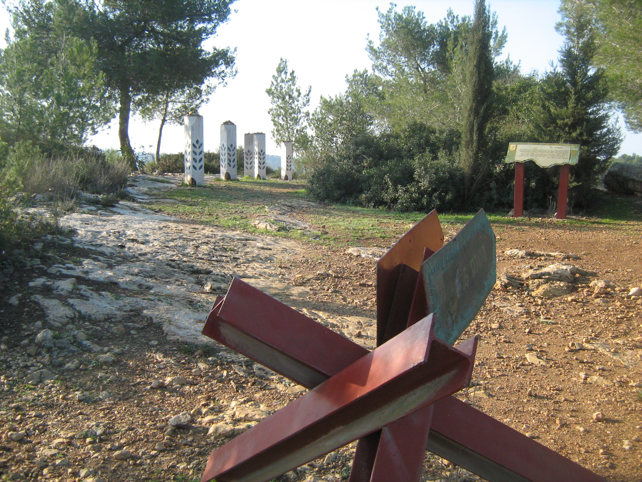 מישלט 16 - דרך בורמה